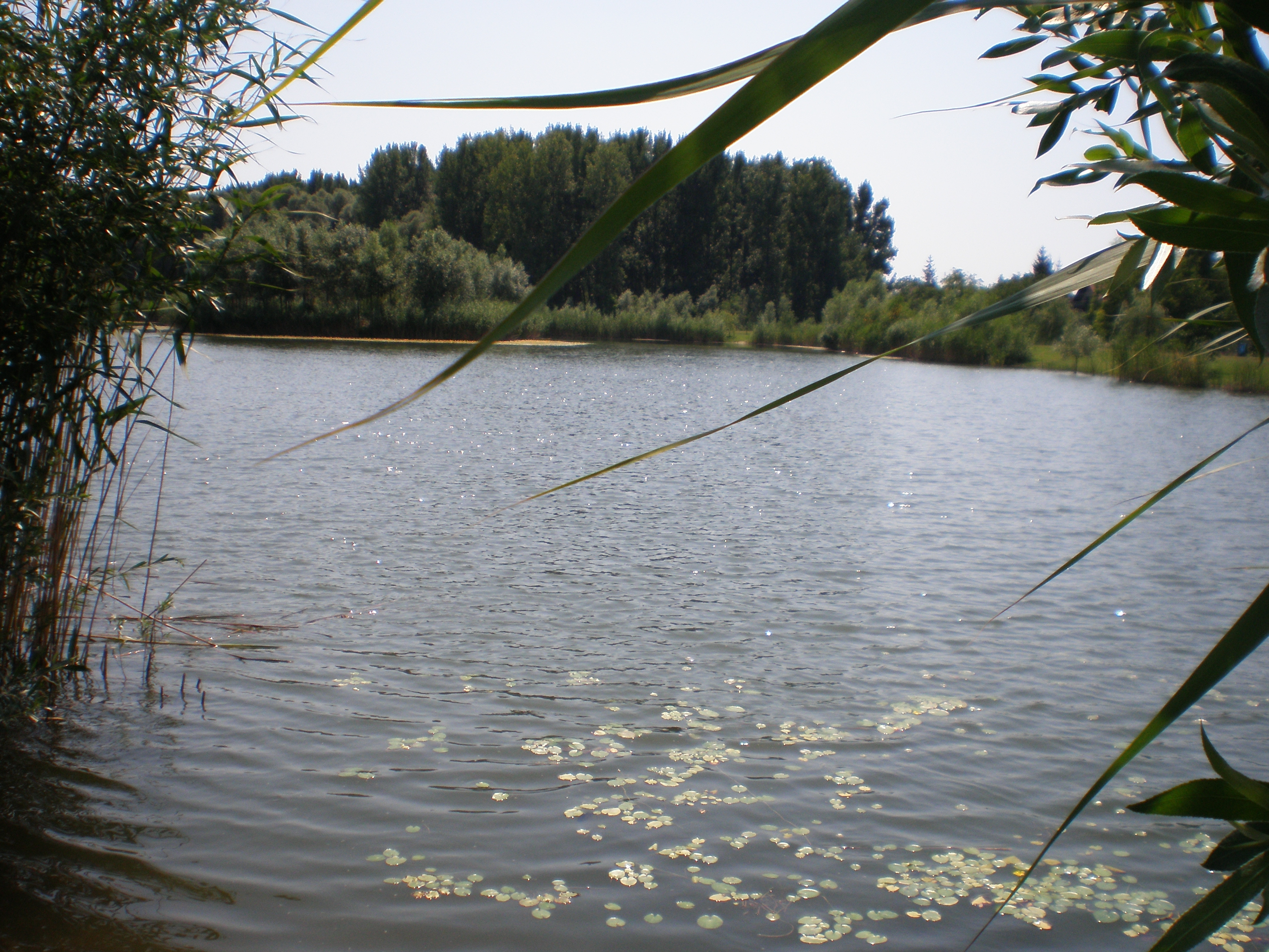 A Morotva-tó Dunaszeg határában (Győr-Moson-Sopron megye, Magyarország)